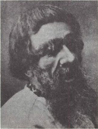 У. М. Крыловіч у ролі Тодарбіча ў спектаклі «У ліпнёвую ноч» («Павукі і мухі») Б.Гарчынскага. 1927. Грым Крыловіча